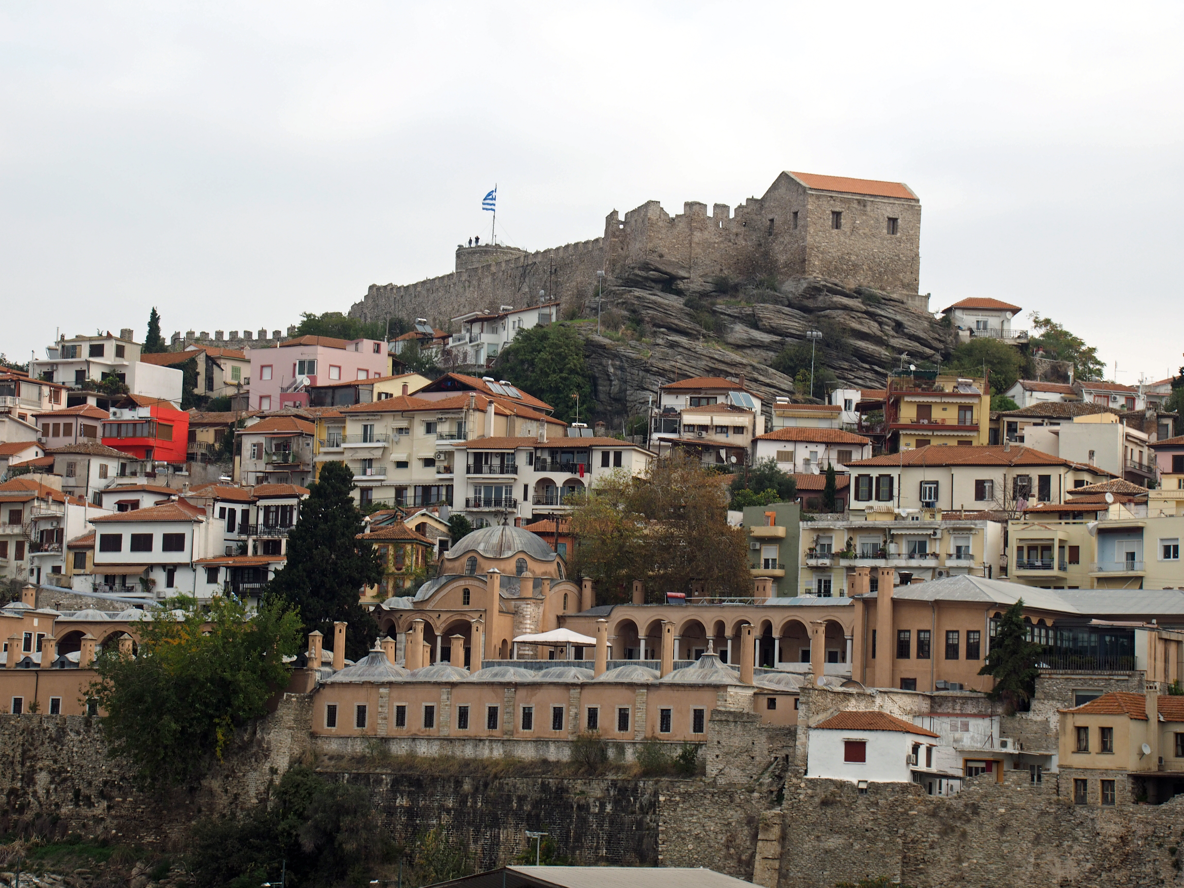 Oben Byzantinische Festung, vorne Imaret Hotel in Kavala (Griechenland)